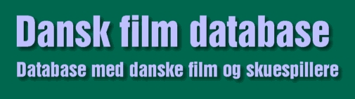 Schriftzug bzw. Logo von Dansk Film Database